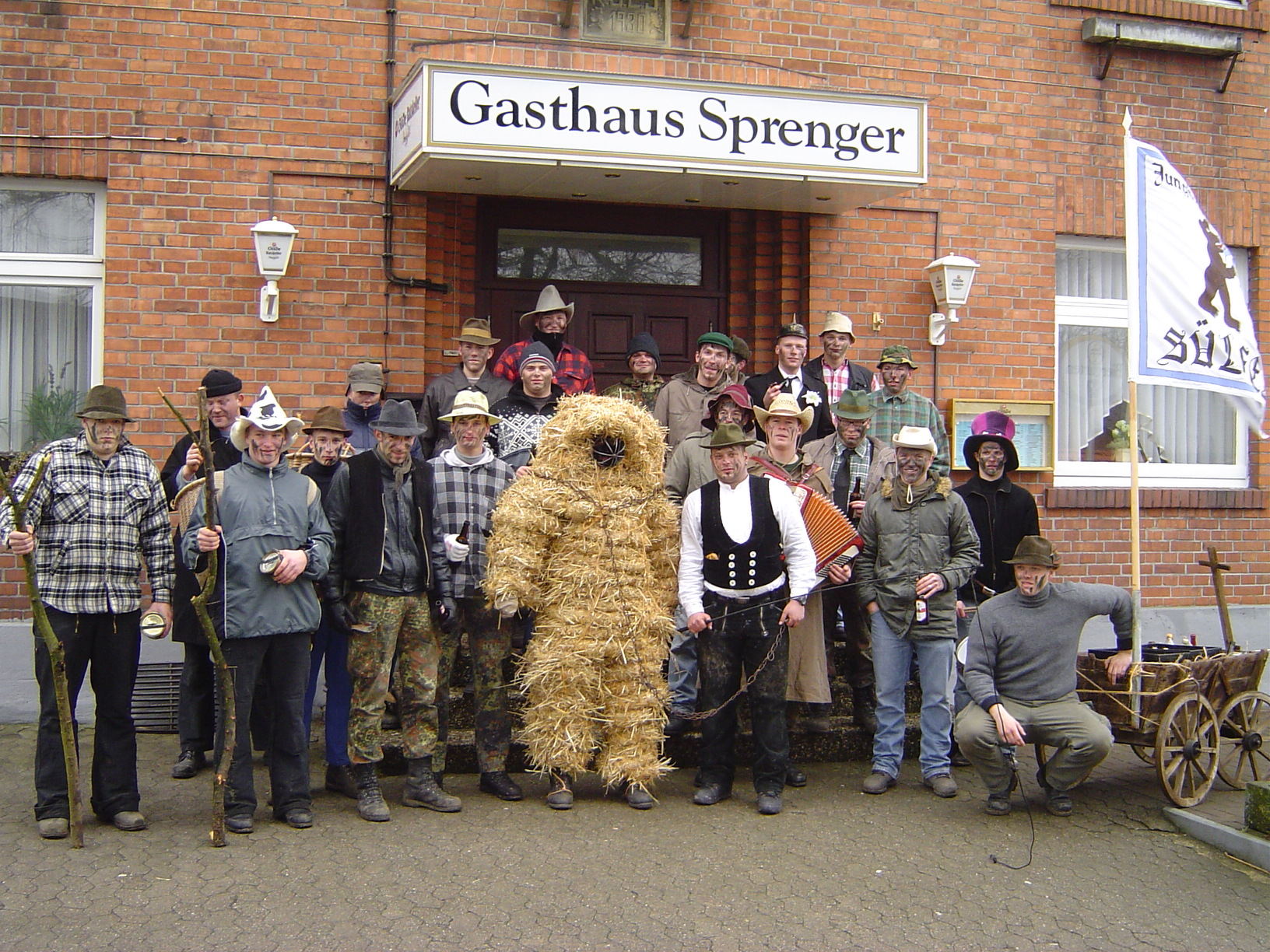 Bärenziehen in Sülfeld, Wolfsburg, Deutschland